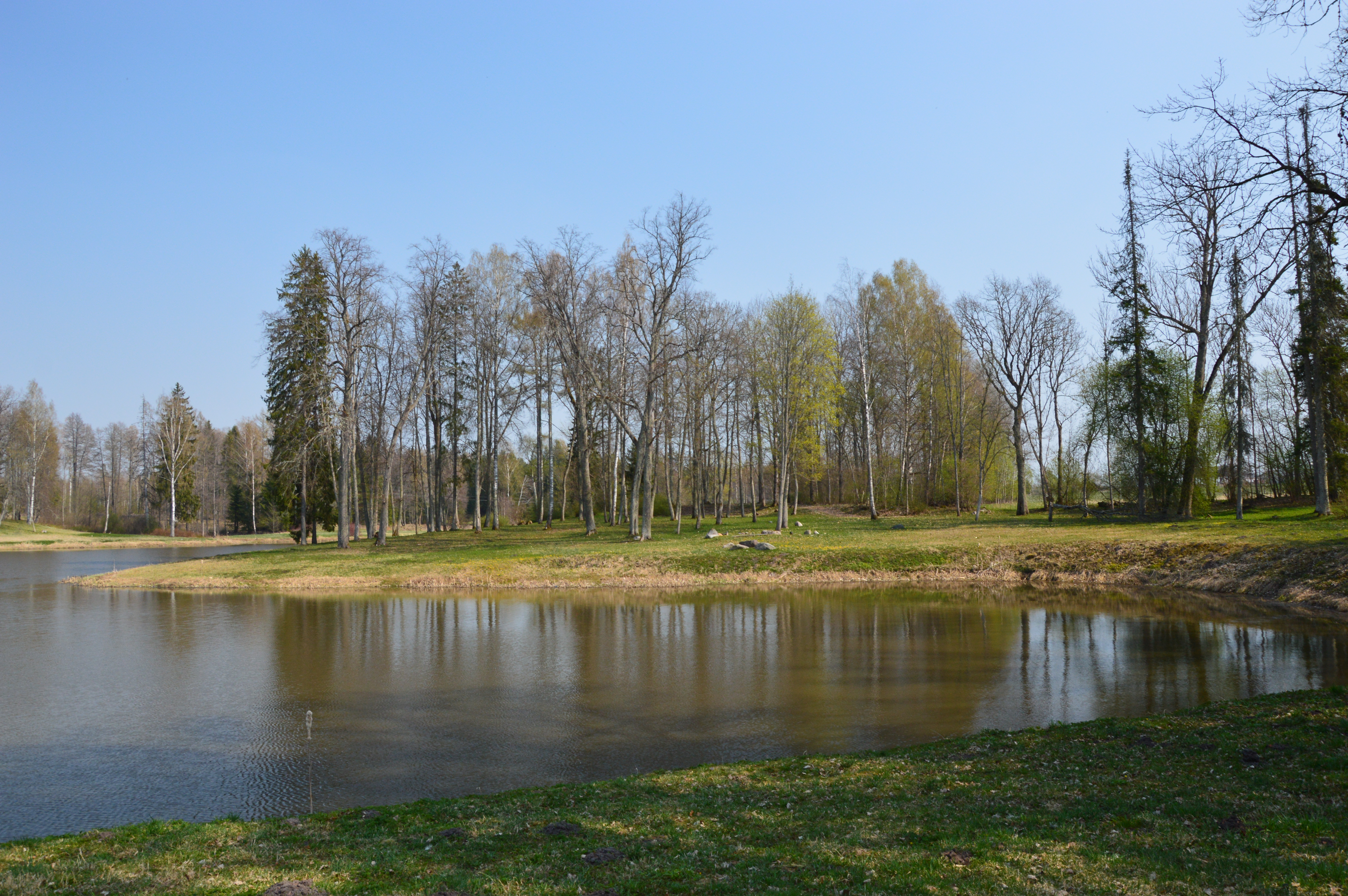 Mõniste mõisa park